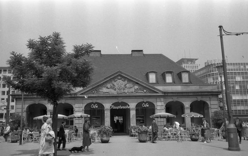 Stadtaufnahmen in Frankfurt/Main Café Hauptwache